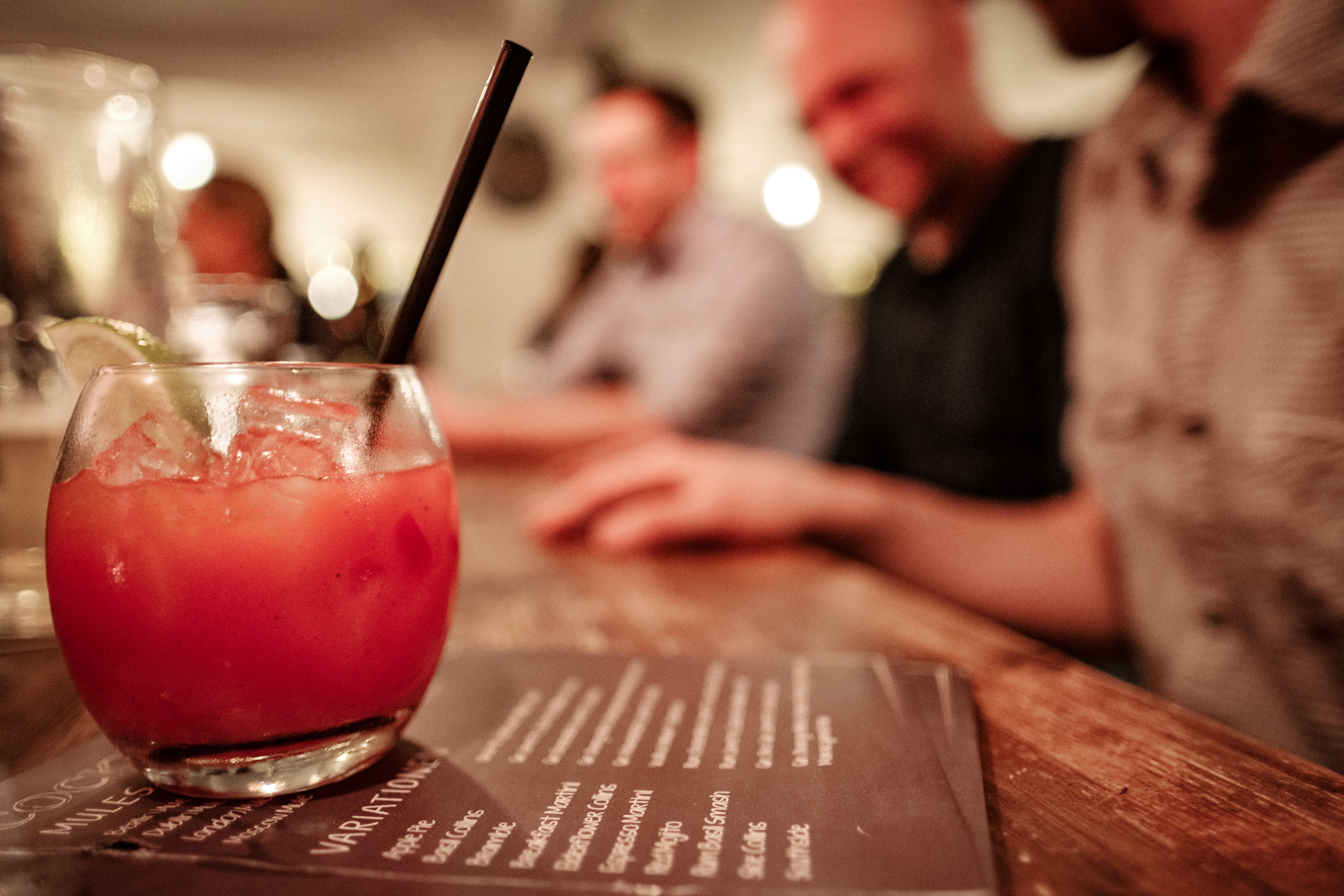 Aperol Sour in der Bar Schmitz Katze in Tübingen